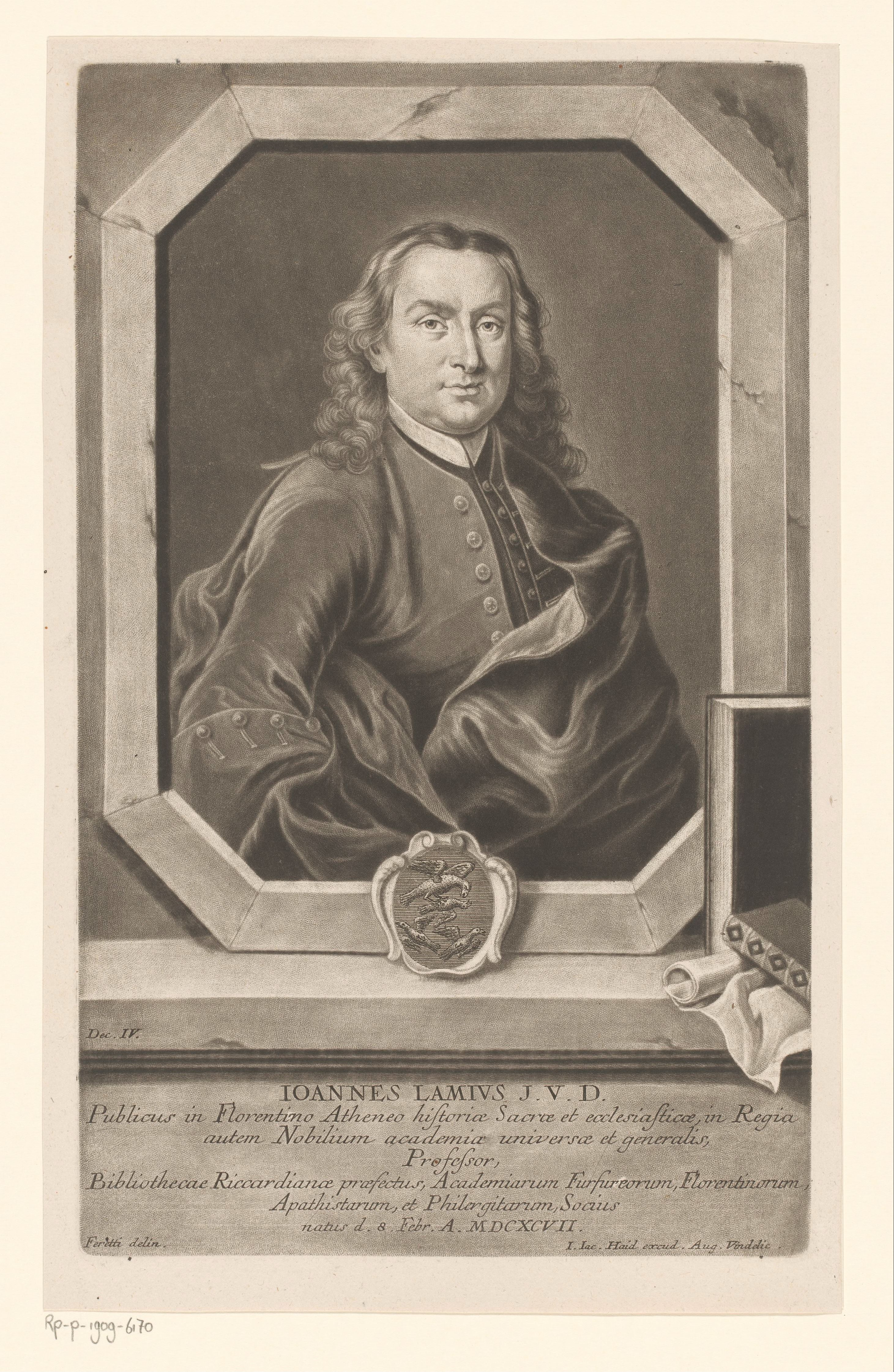 IdentificatieTitel(s): Portret van Giovanni LamiObjecttype: prent Objectnummer: RP-P-1909-6170Catalogusreferentie: HAB A 11885Opschriften / Merken: verzamelaarsmerk, verso, gestempeld: Lugt 2228Omschrijving: Met onderschrift in het Latijn.VervaardigingVervaardiger: prentmaker: Johann Jacob Haid (mogelijk)naar tekening van: Giovanni Domenico Ferretti (vermeld op object)uitgever: Johann Jacob Haid (vermeld op object)Plaats vervaardiging: AugsburgDatering: 1745Materiaal: papier Techniek: mezzotint / etsenAfmetingen: plaatrand: h 310 mm × b 190 mmToelichtingPrent gebruikt voor: Brucker, Jacob. Bildersal heutiges Tages lebender und durch Gelahrheit berühmter Schrifftsteller. Augsburg: Johann Jacob Haid, 1745.OnderwerpWat: historical personsarmorial bearing, heraldrybookWie: Giovanni LamiVerwerving en rechtenVerwerving: aankoop 1905Copyright: Publiek domein